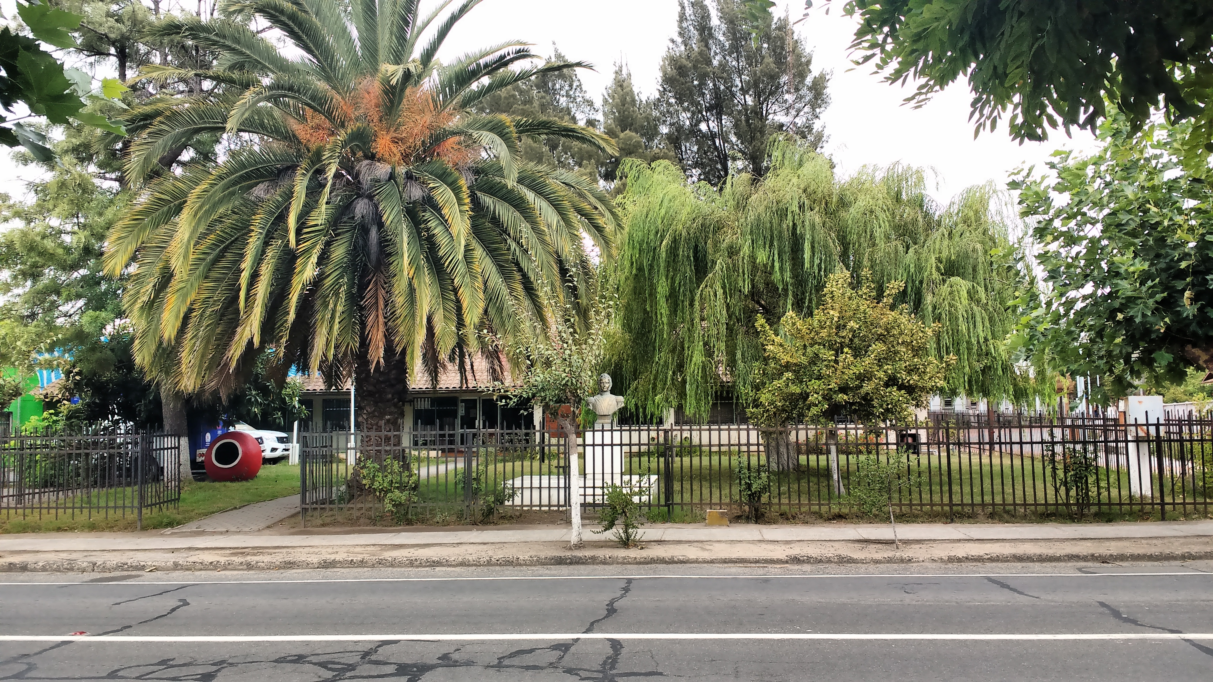 Municipalidad de la comuna de Trehuaco , Octava Región de Chile.